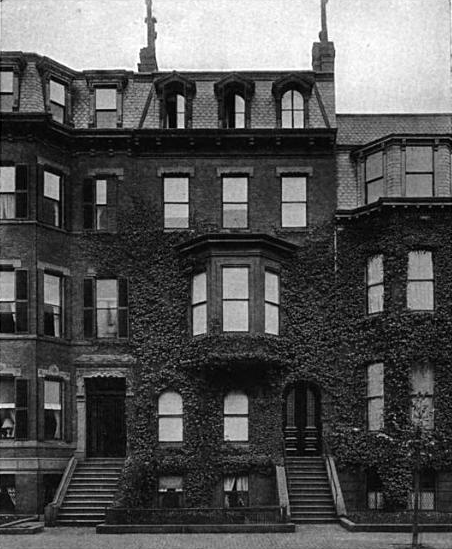 Boston, Massachusetts